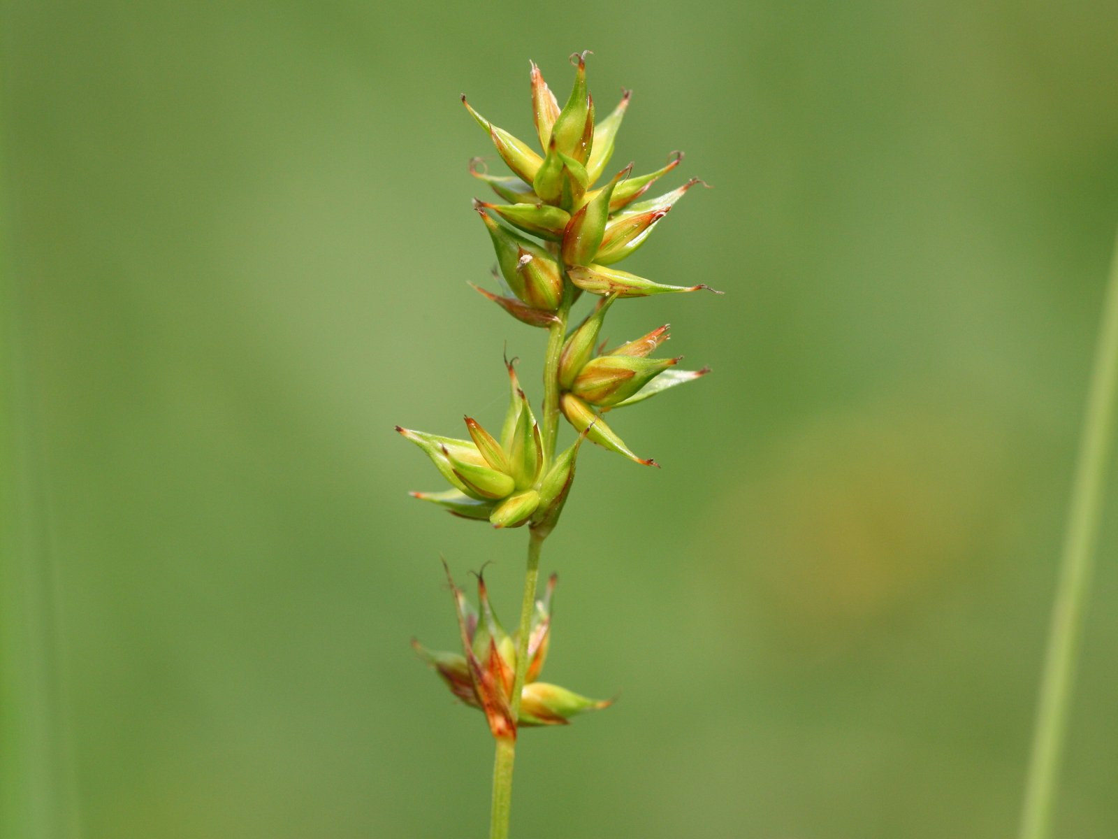 Stachel-Segge (Carex spicata)